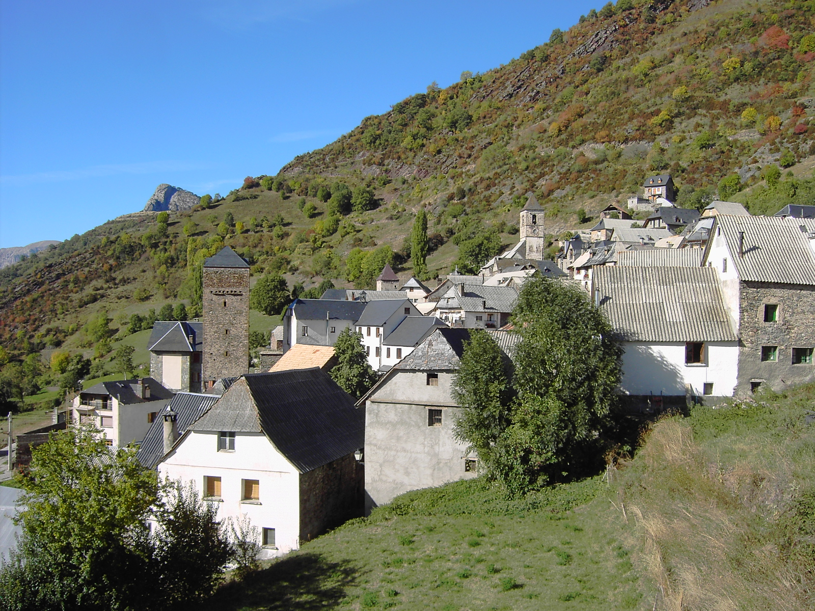 Gistaín, el núcleo más elevado del Valle de Gistau.